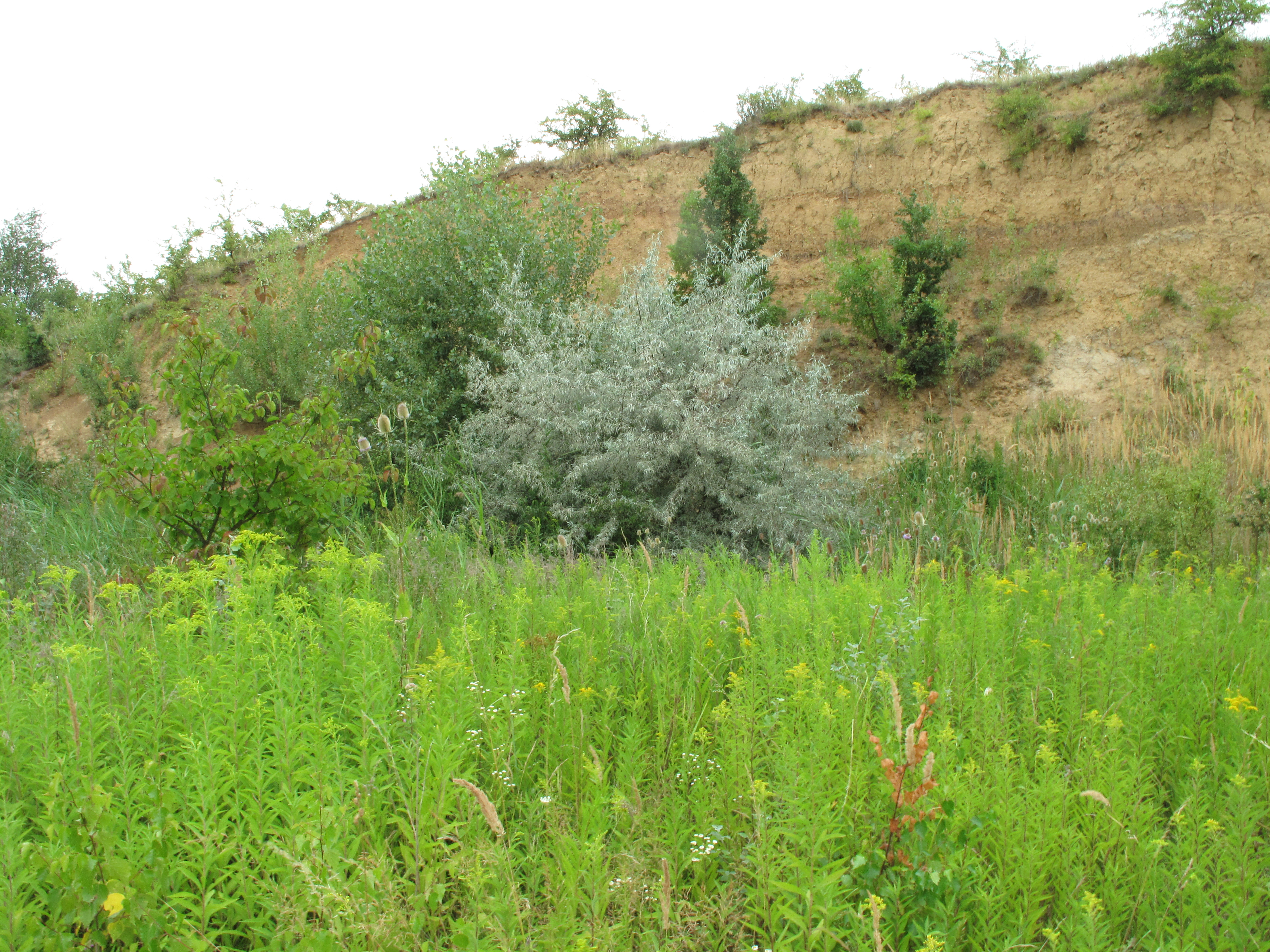 Přírodní památka Kienberg. Okres Břeclav, Česká republika.